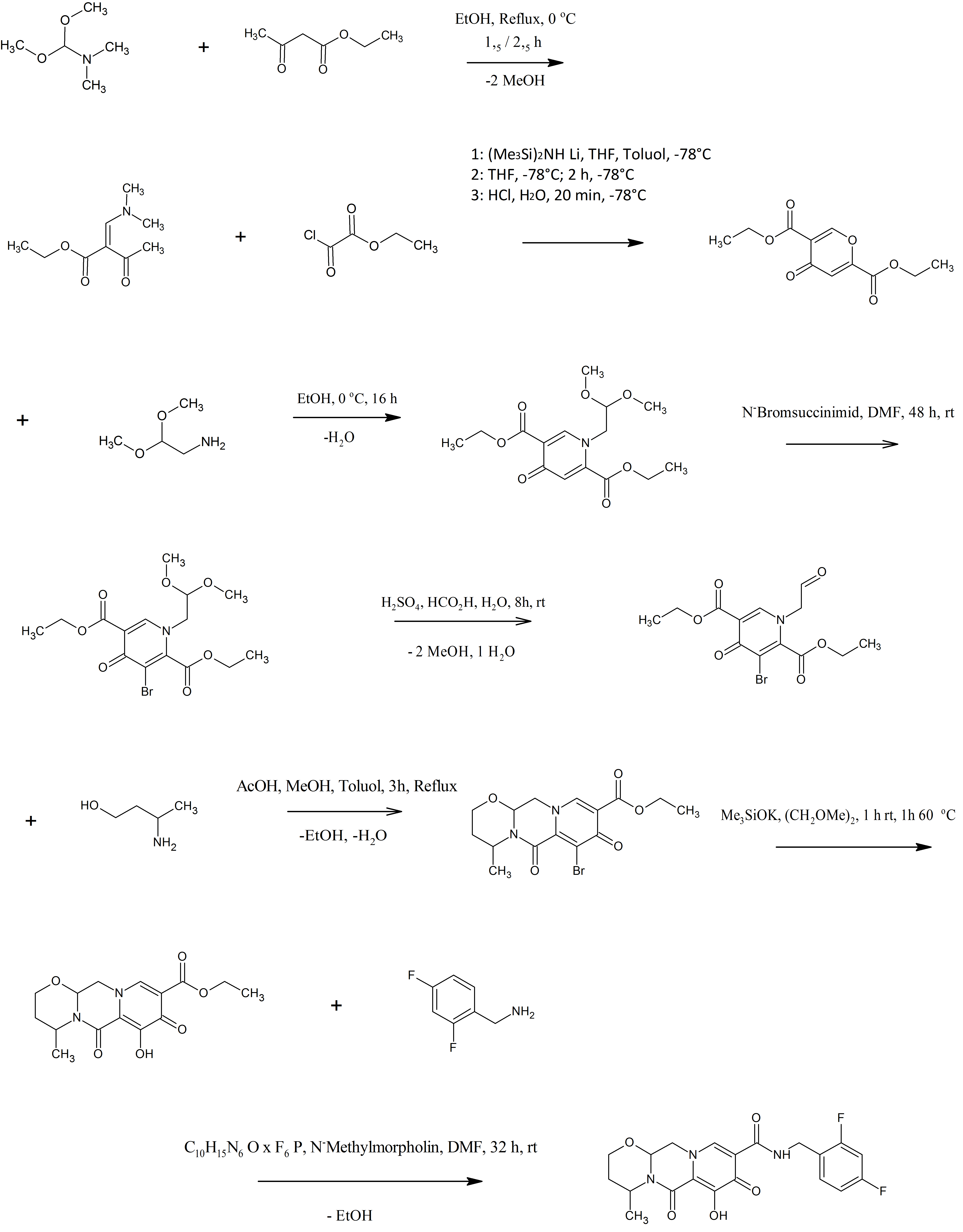 gezeichnet nach der Synthese aus: Sumino, Yukihito; Okamoto, Kazuya; Masui, Moriyasu; Yamada, Daisuke; Ikarashi, Fumiya; Preparation of compounds having HIV integrase inhibitory activity; Shionogi & Co., Ltd., Japan; Patent : WO 2012018065 A1, 2010 (aus SciFinder)